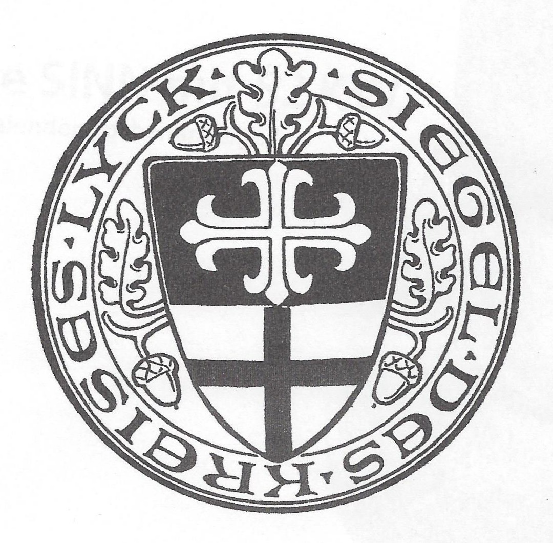 Amtliches Siegel des Kreises Lyck. Das obere Kreuz ist dem 1929 gehobenen Fürstenschmuck von Skomanten entnommen. Es ist charakteristisch für die Siedlungsepoche der Sudauer. – Das untere ist das Kreuz des Deutschen Ordens.